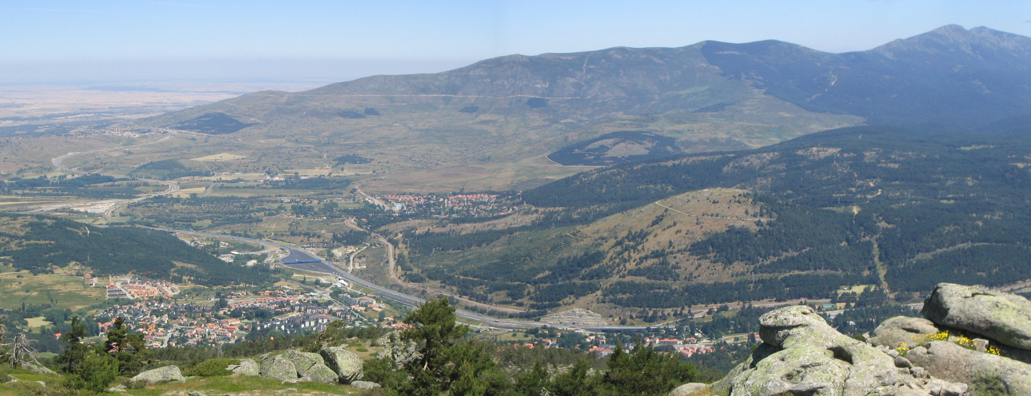 El Espinar, Segovia España. Vista general del barrio de San Rafael.